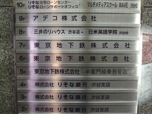 渋谷共和ビル 案内板